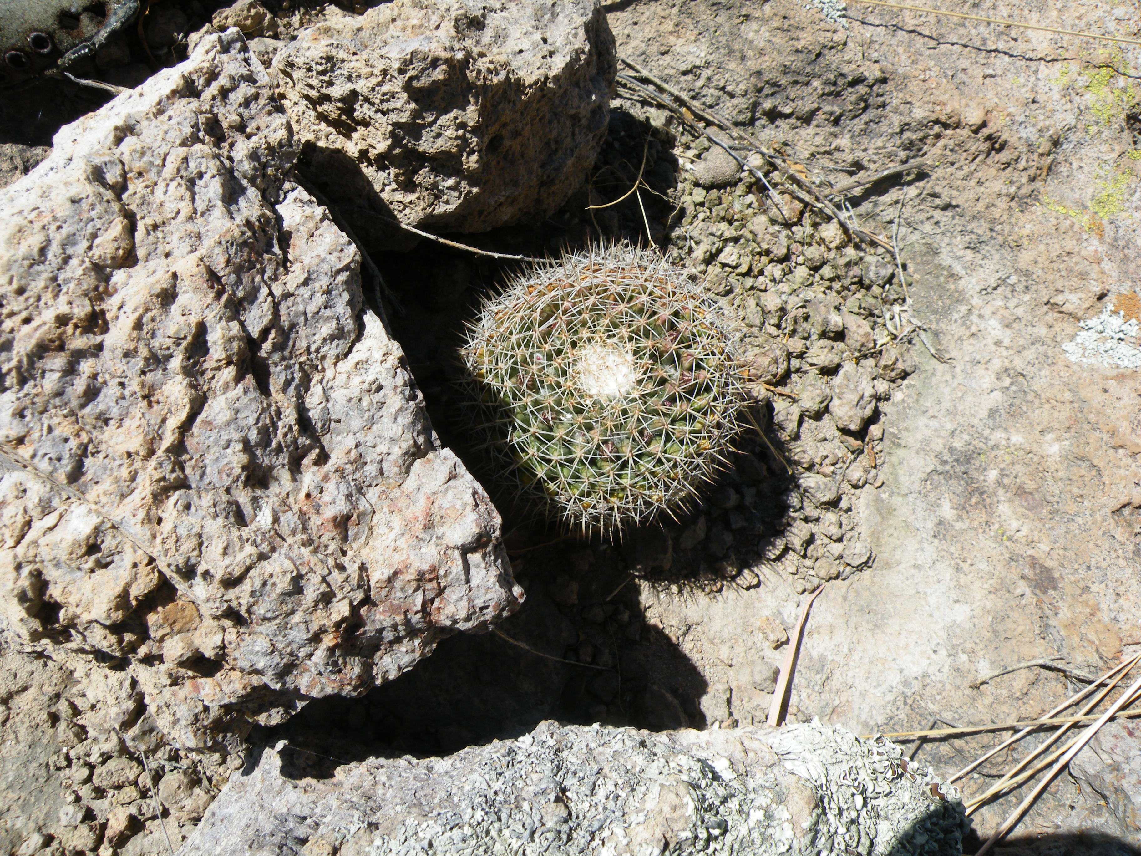 Near el Ocote, Aguascalientes